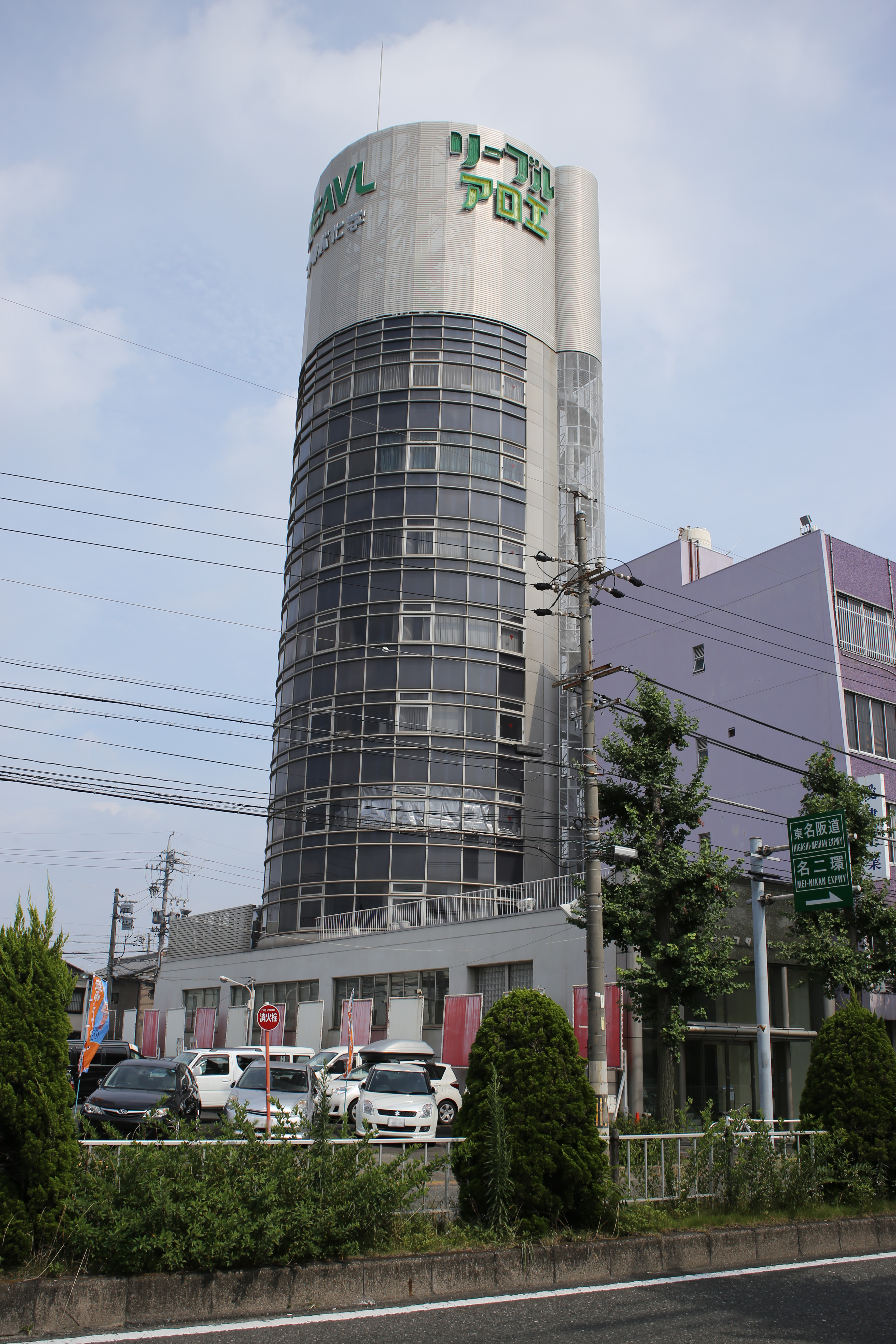 名古屋市中村区沖田町のフタバ化学ビルを西側公道北側より撮影。ただし、ナンバープレートにつき画像処理済。